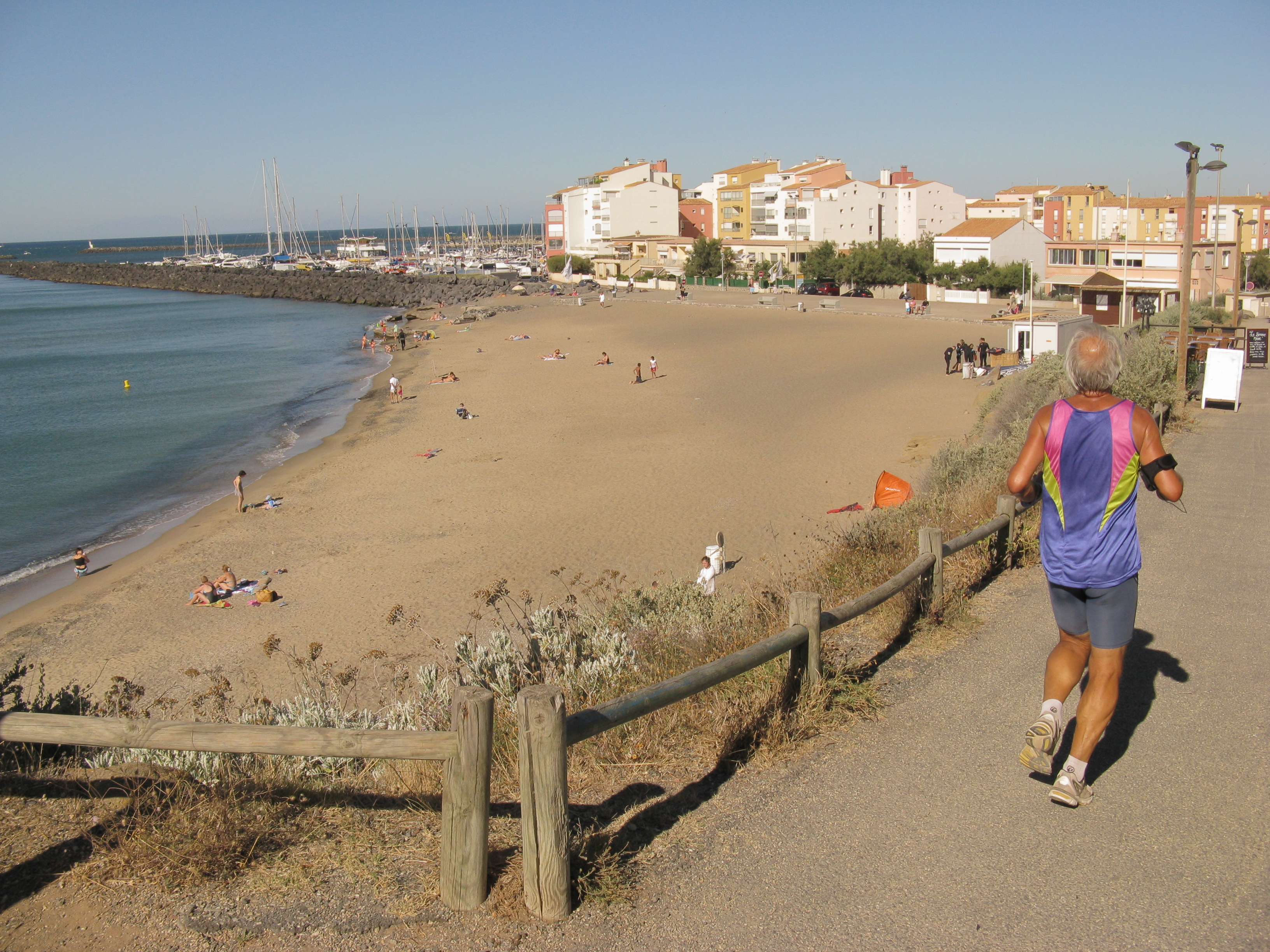 The Plage de la Plagette in Le Cap d'Agde, France.